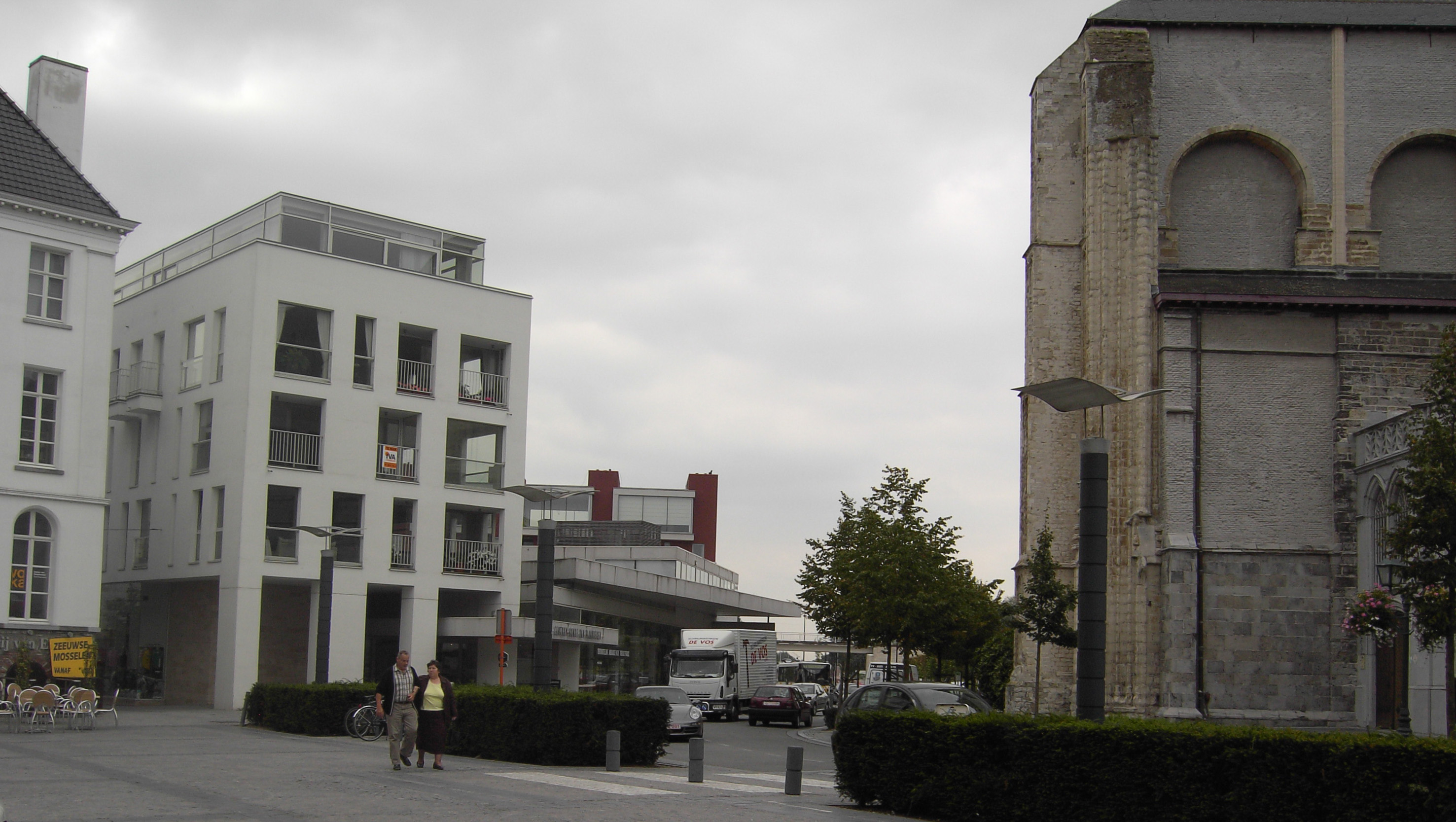 Wielermuseum Ronde van Vlaanderen te Oudenaarde